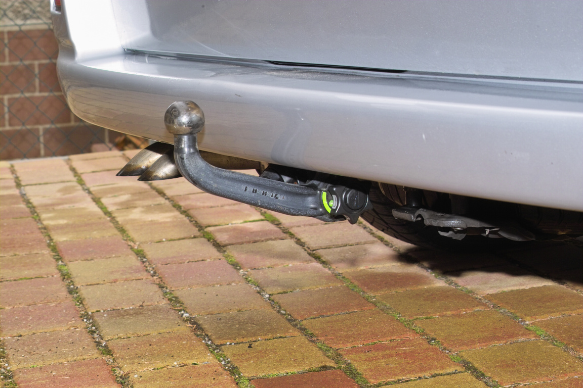 Abnehmbare PKW-Anhänger-Kupplung (montiert an einem VW-Multivan)